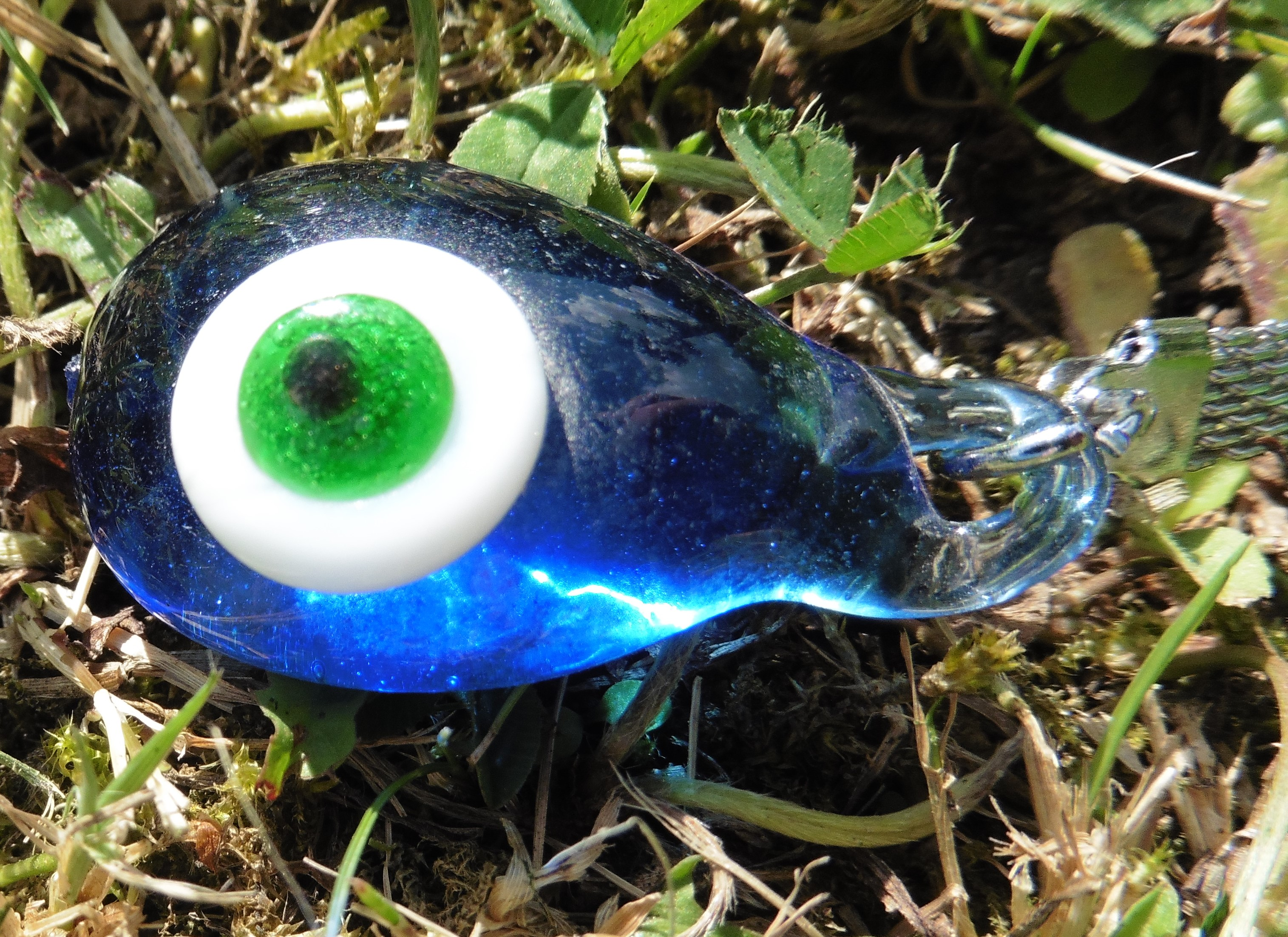 Amulette turque Nazar boncuk .- L'oeil bleu qui vise à protéger contre le « mauvais œil »